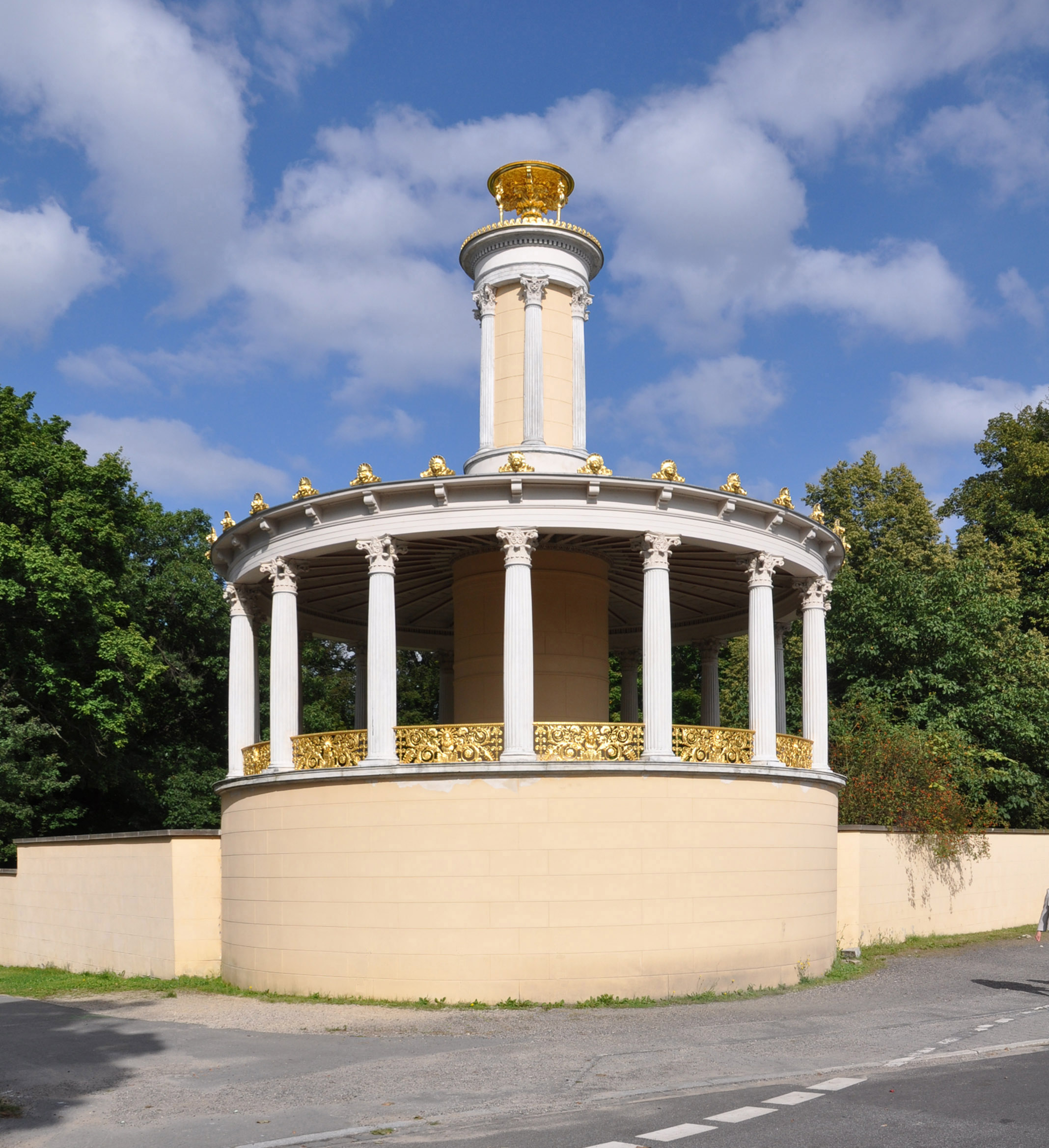 Park Klein-Glienicke Rotunde von Südwest, Foto 2012